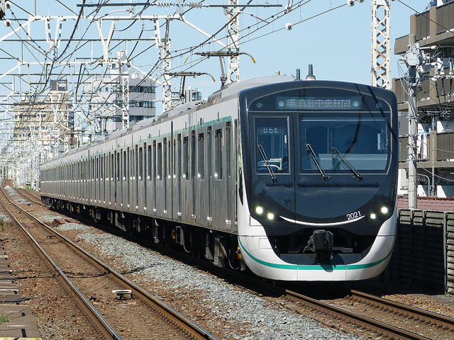 東武スカイツリーラインを走行する東急2020系。五反野駅にて。 Panasonic Lumix DMC-FZ150